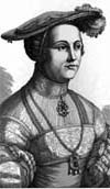 Cette image présente le portrait de Jeanne Hochberg